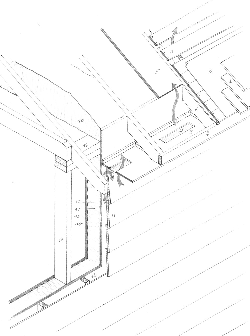 essai de coupe dans une jonction mur-toit, pour un des deux systèmes que j’ai choisis comme les plus adaptés au climat belge : Ossature en bois dessiné par utilisateur:vahuge et mis dans le domaine public